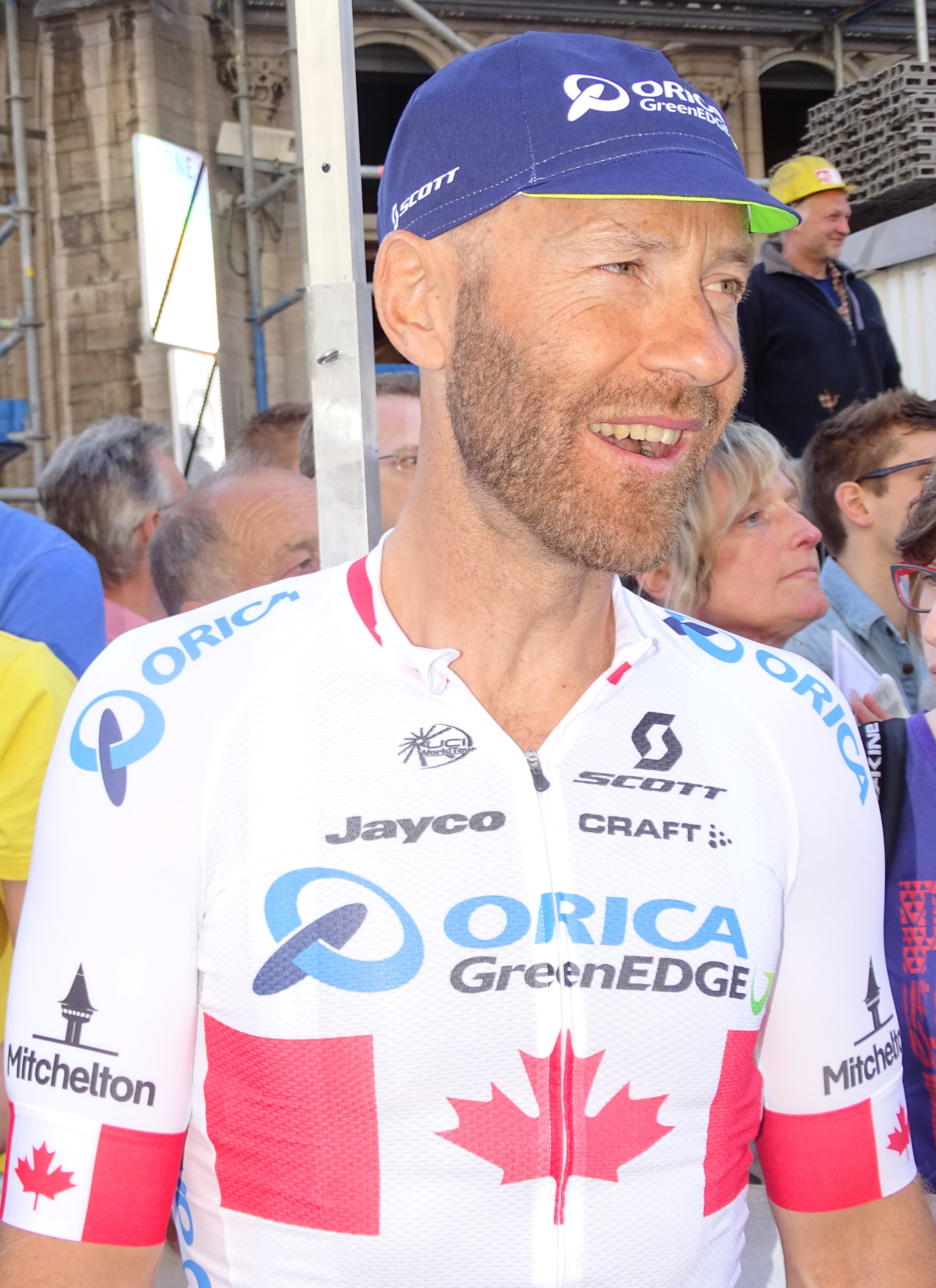 Reportage réalisé le mercredi 15 avril à l'occasion du départ de la Flèche brabançonne 2015 à Louvain, Belgique.